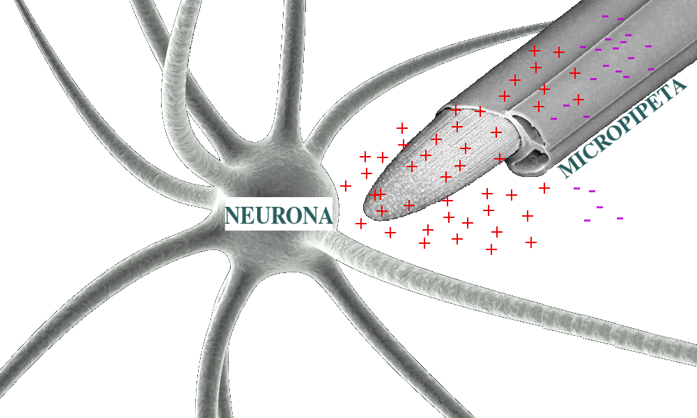 Método de microiontoforesis. Esquema de neurona basada en el trabajo de Nicolas P. Rougier